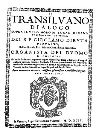 foto del frontespizio del Transilvano di DIruta